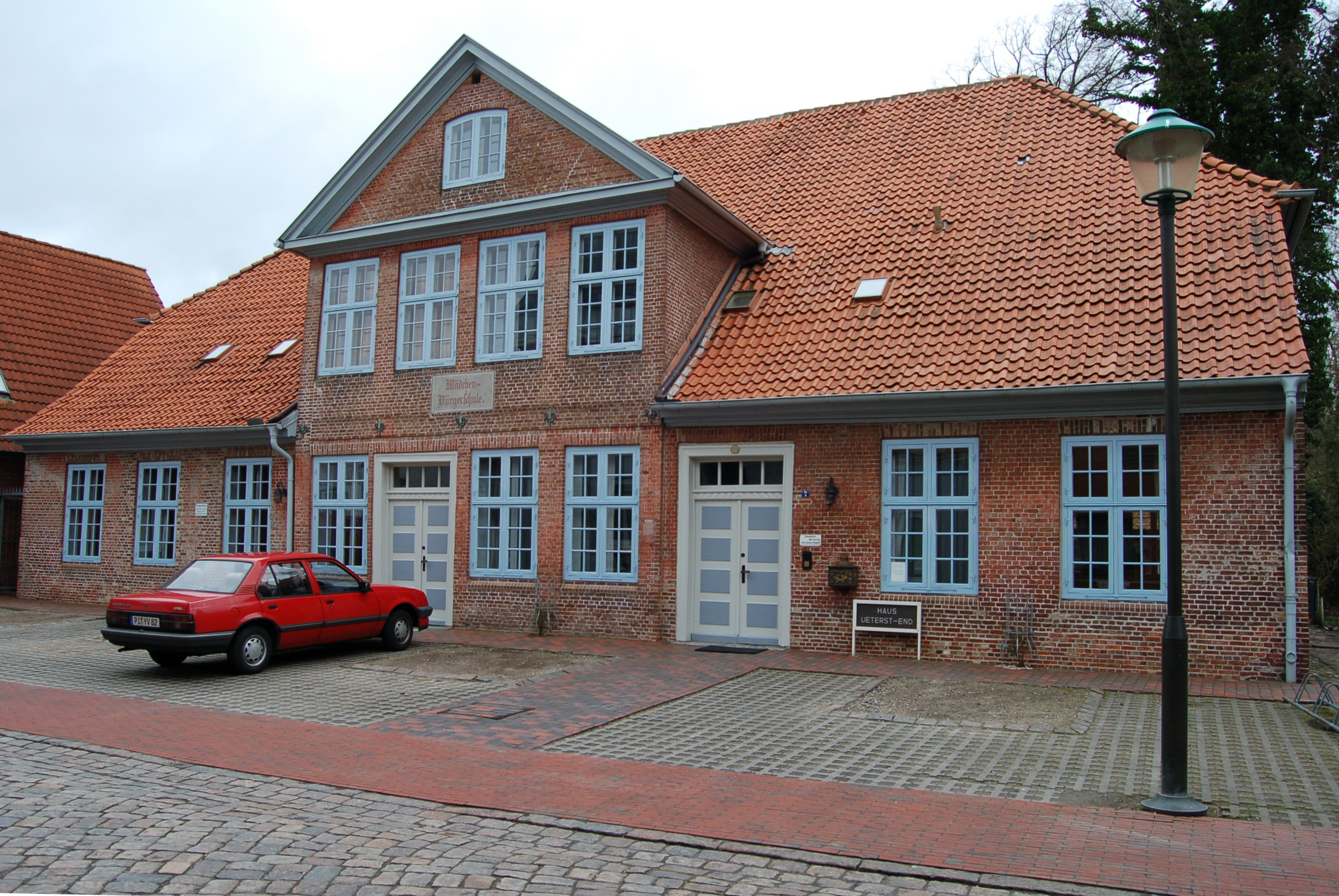 Alte Mädchen-Bürgerschule in der Kirchenstraße aus dem Jahr 1813, heute ein Museum.